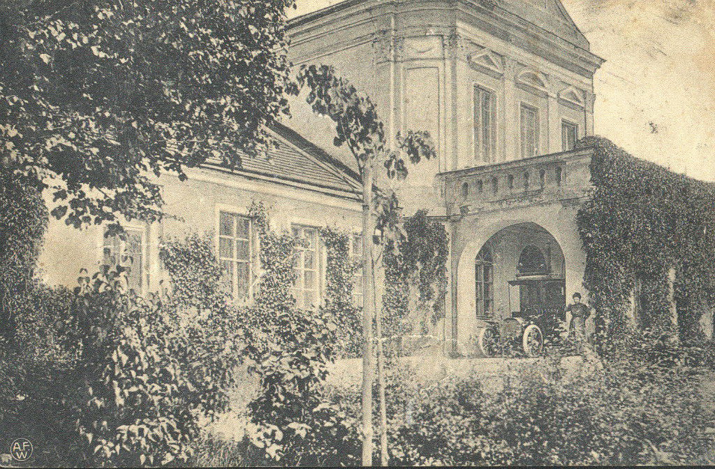 Беларуская (тарашкевіца): Горадня (Horadnia), Станіславова (Stanisłavova). Сядзіба